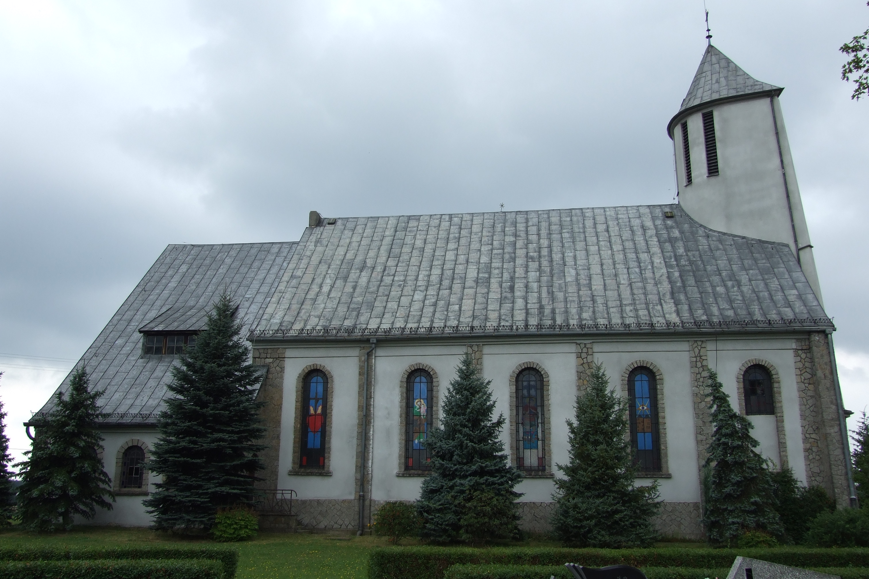 Kościół parafialny w Sowczycach